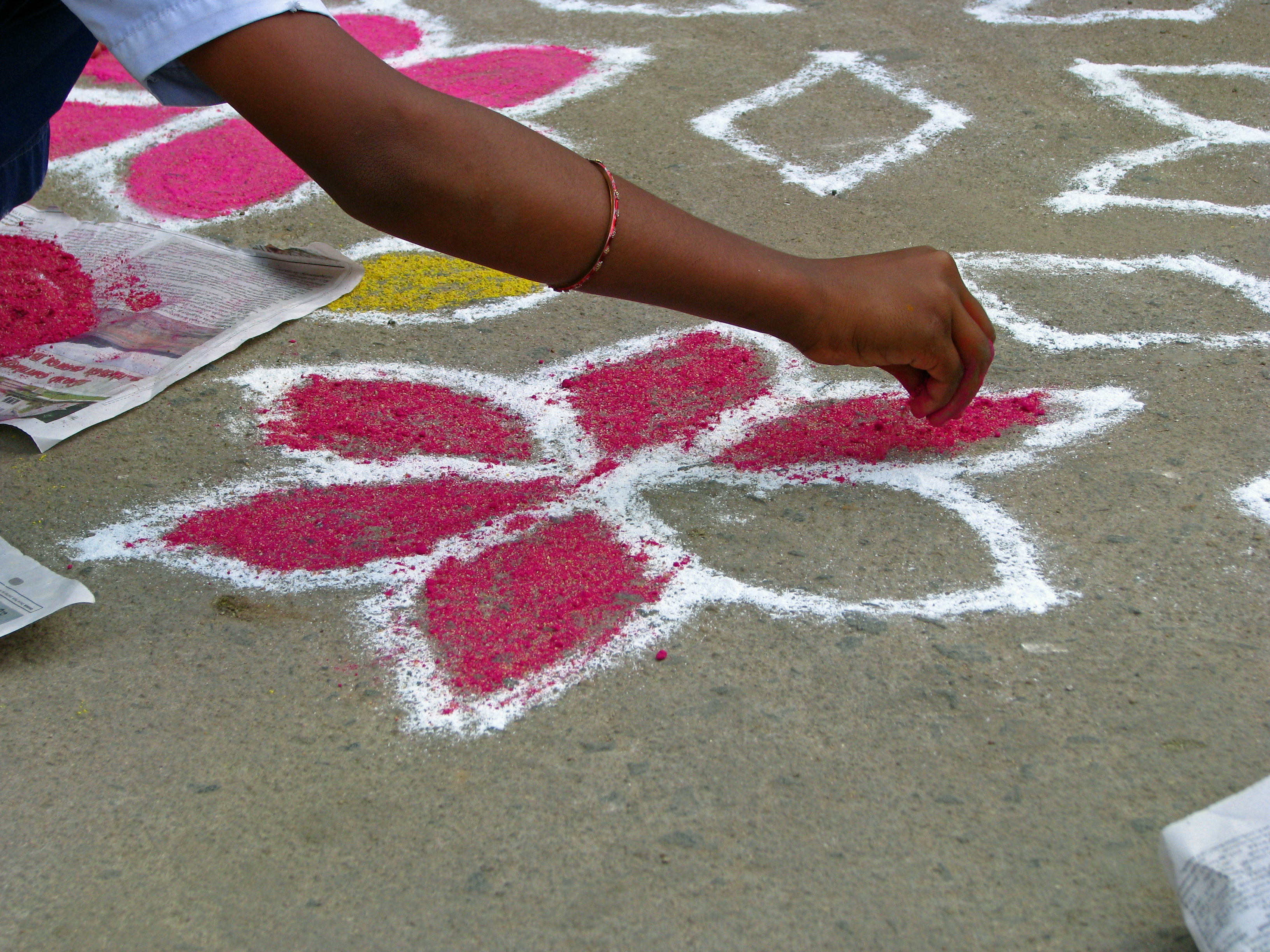 India - Kolam - 06